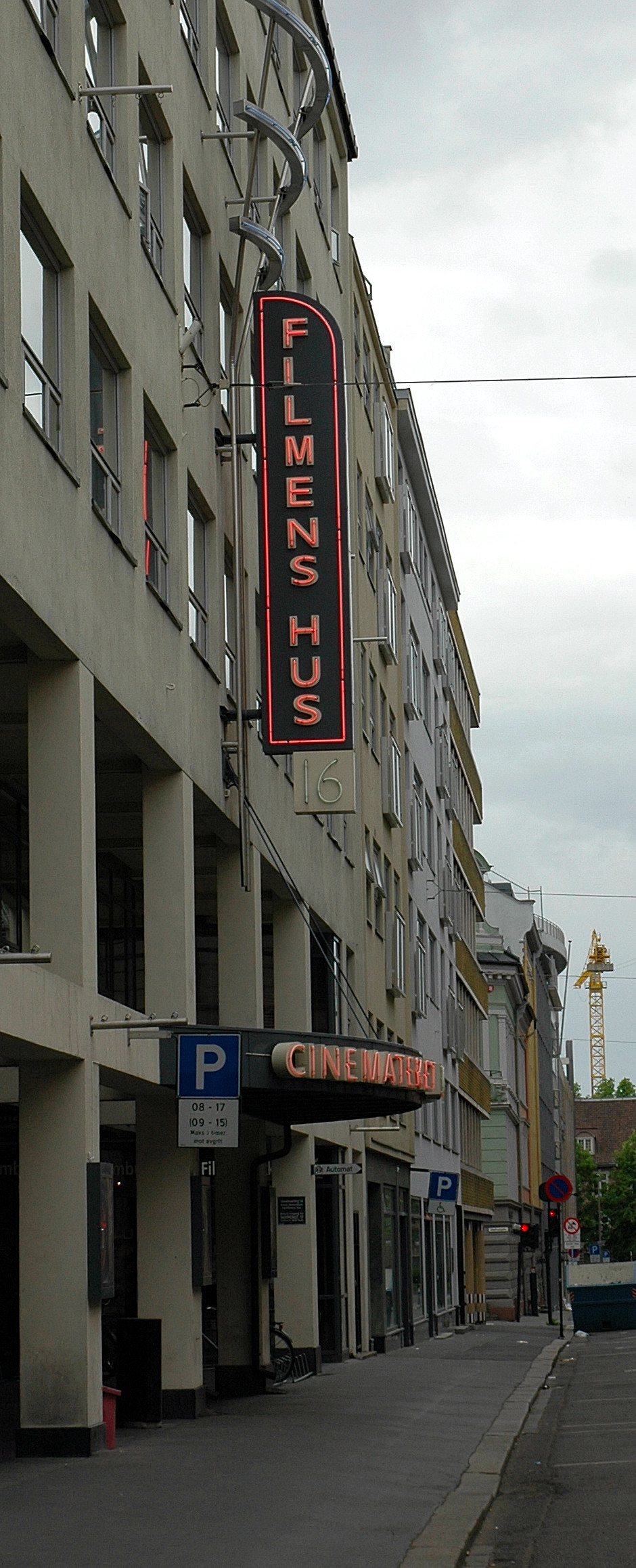 Filmens hus, Oslo